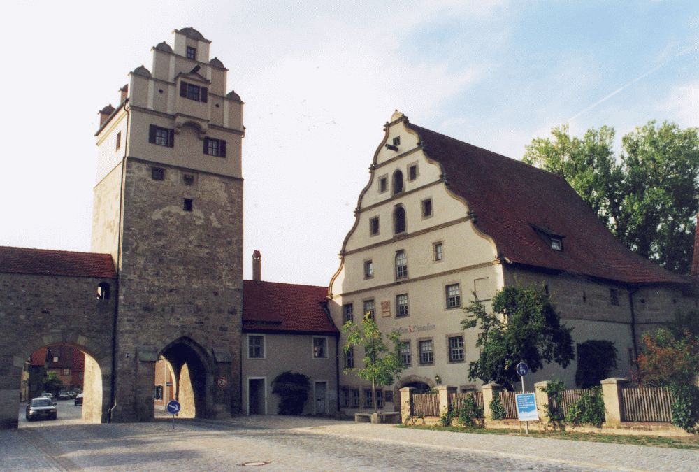 Dinkelsbühl Nördlinger Tor mit 3D-Museum. Fotografiert im Sommer 2003